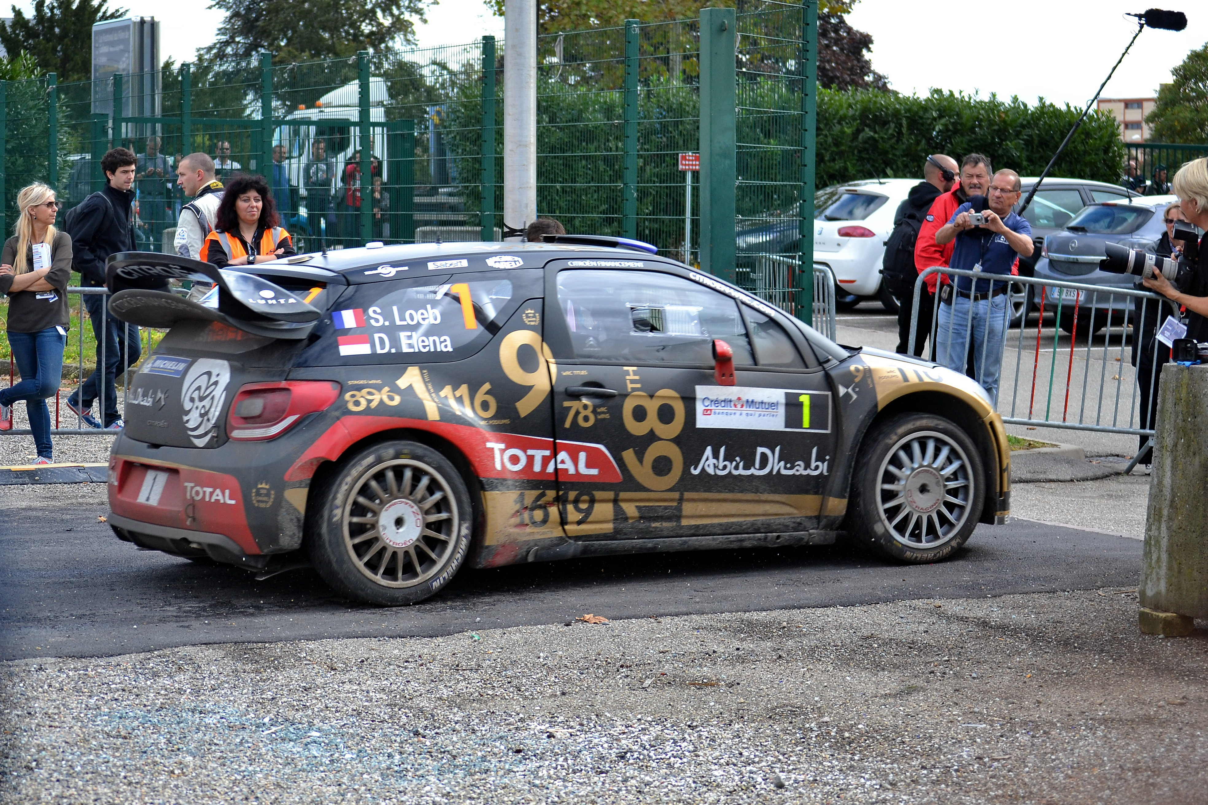 Sébastien Loeb au parc d'assistance de Colmar durant le Rallye de France-Alsace 2013. La voiture est ornée d'une livrée couleur noire et or reprenant les principaux records de la carrière du nonuple champion du monde.